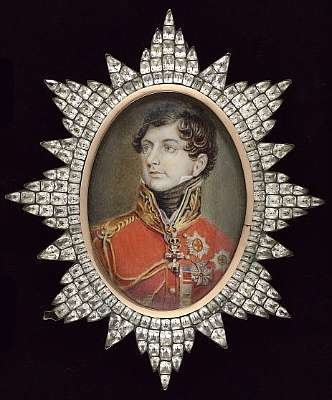 Order from the times of George IV of the United Kingdom